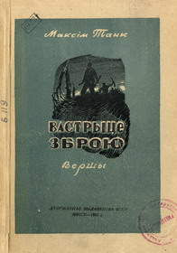 Вокладка зборніка вершаў Максіма Танка "Вастрыце зброю", 1945 г.